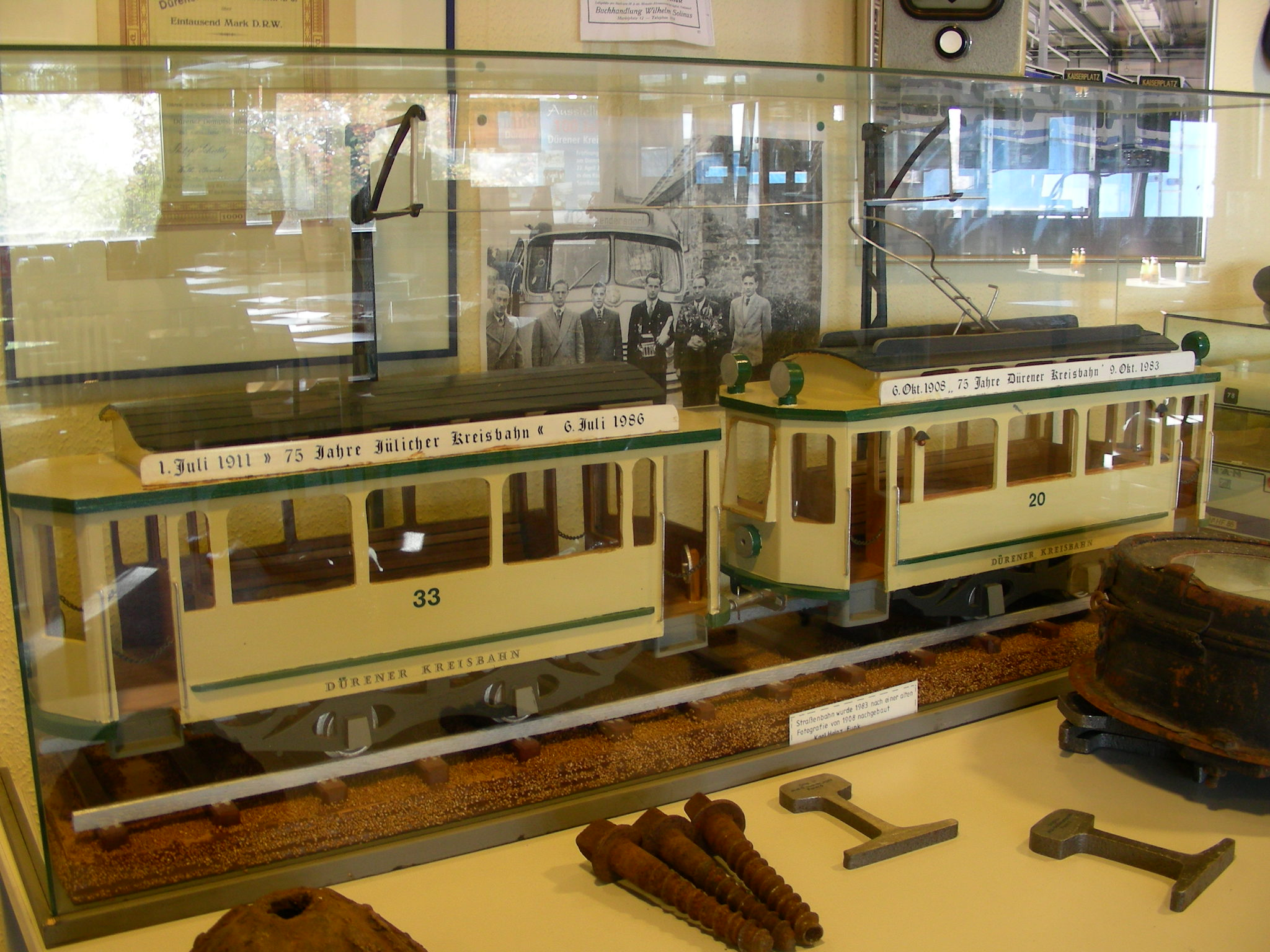 Sperrholzmodell einer Straßenbahn der Dürener Kreisbahn (DKB), erbaut von Karl-Heinz Funk aus Nörvenich, Exponat der historischen Ausstellung in der DKB-Zentrale Düren-Distelrath, aufgenommen bei einer Betriebsbesichtigung am 19. Oktober 2008, ab 2009 im Museum "DKB-Zeitreise" im Bahnhof Heimbach (Eifel)